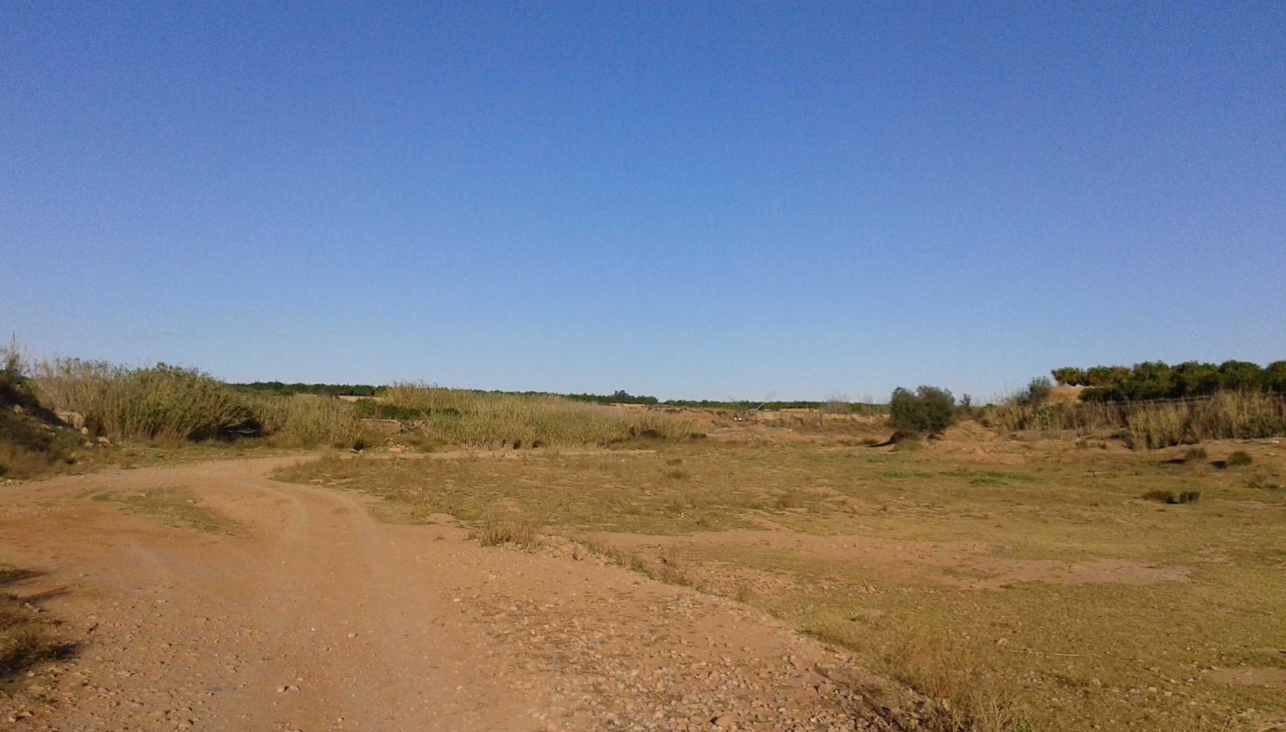 Ullal del Pont Sec al Barranc del Carraixet